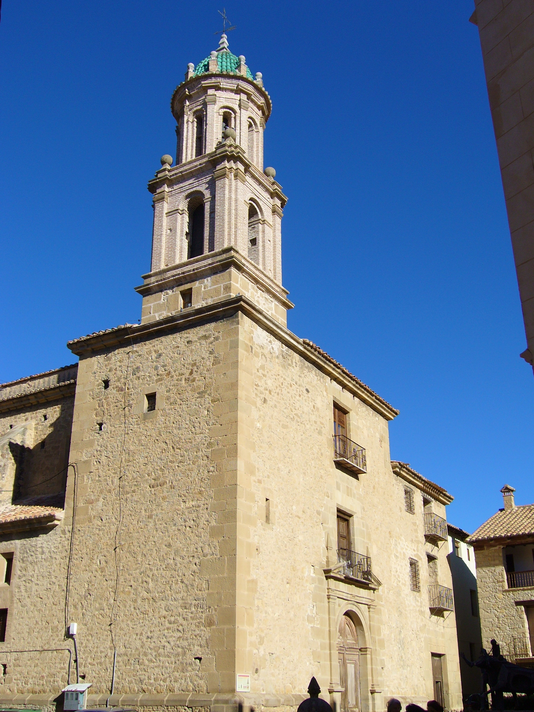 Rubielos de Mora